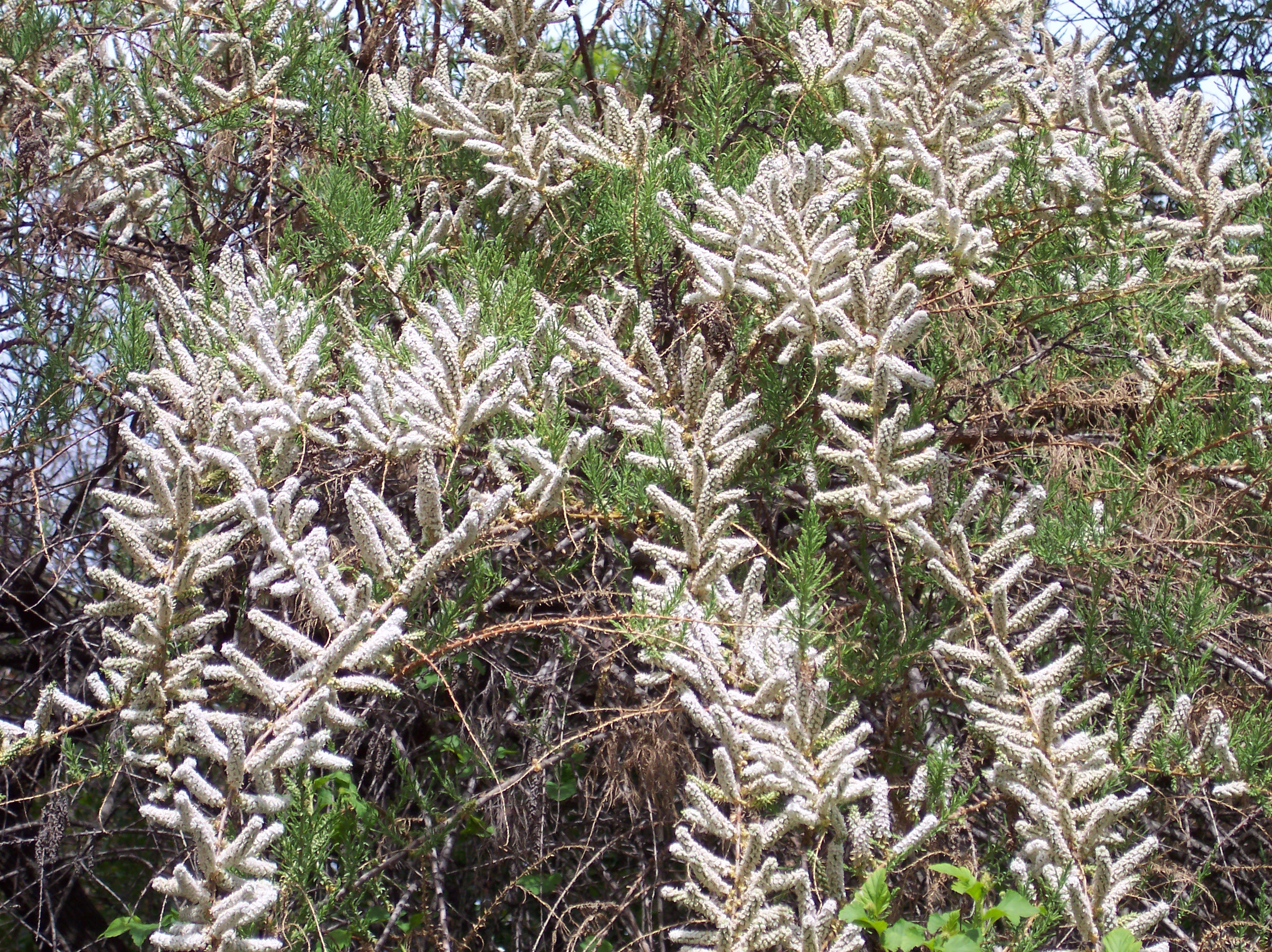 Tamarix boveana. Real Jardín Botánico, Madrid